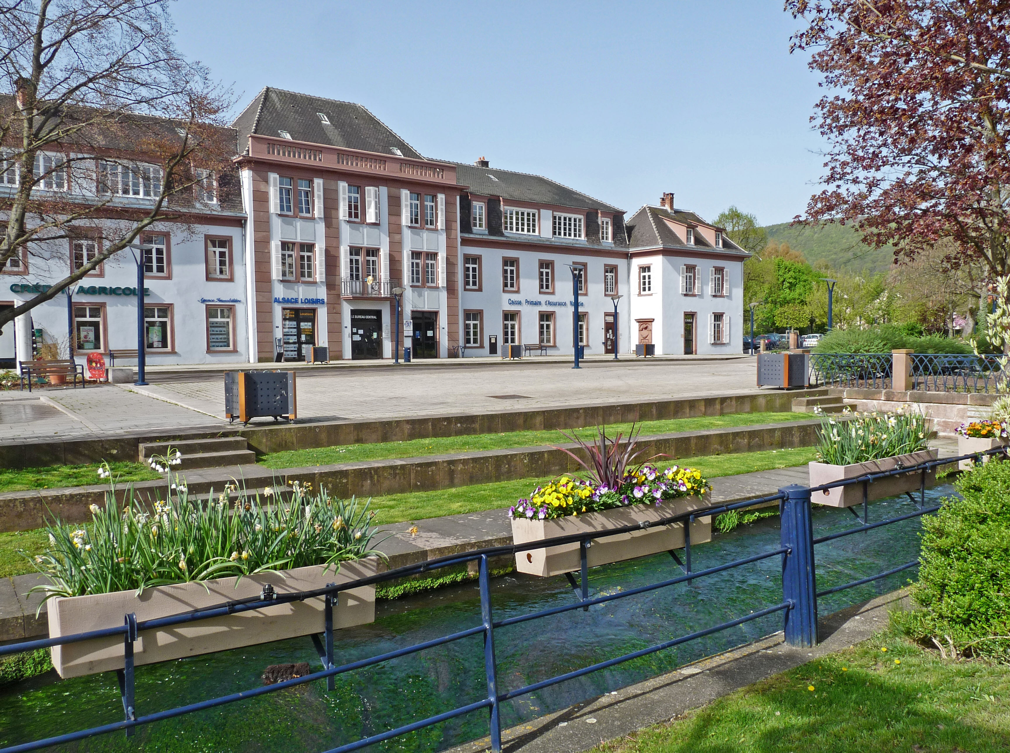 Bureau central : ancien siège de la société De Dietrich à Niederbronn-les-Bains (Bas-Rhin).